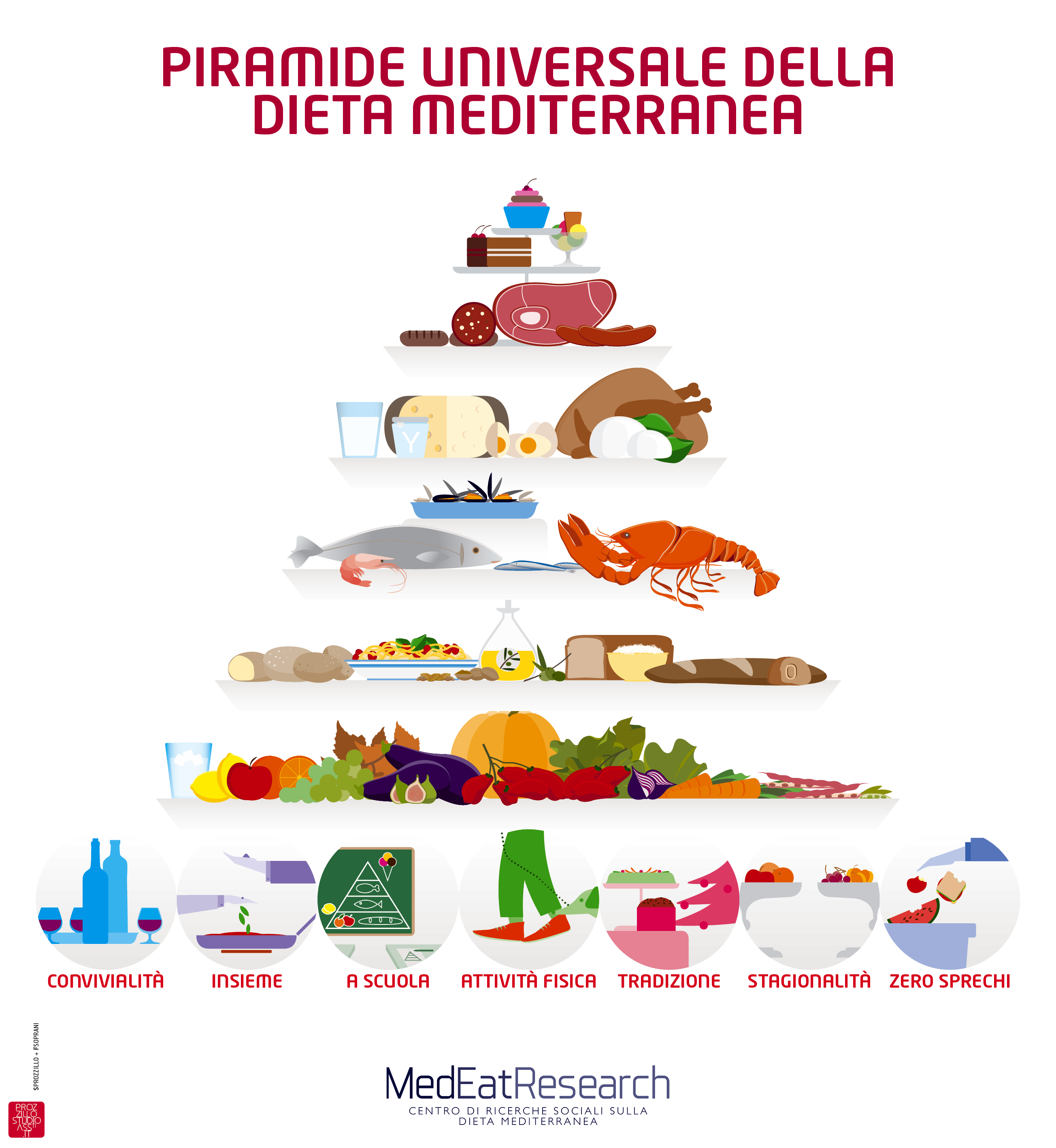 Nel 2015, lo studio condotto dal MedEatResearch diretto dall'antropologo Marino Niola, ha allargato la tradizionale piramide nutrizionale alle pratiche sociali, formulando la "Nuova Piramide alimentare" della Dieta Mediterranea. Sette sono le parole chiave poste alla base di tale piramide: convivialità, tradizione, stagionalità, attività fisica, insieme, a scuola, zero spechi